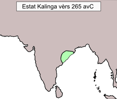 Extension de l'Estat Kalinga avans l'invasion maurya vèrs 265 avC.